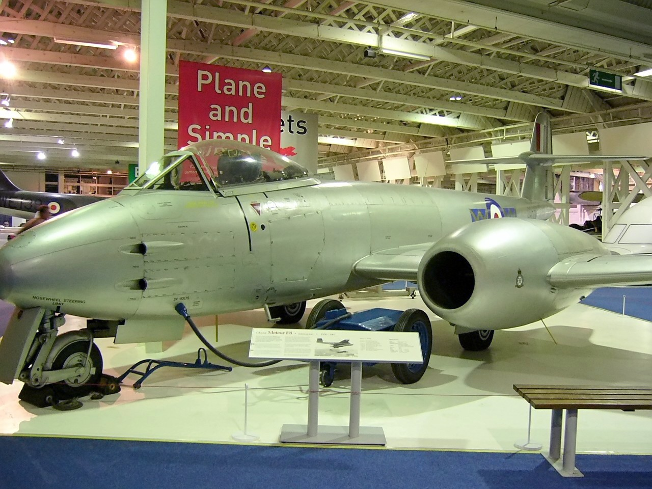 Meteor F8 in RAF Museum, Hendon